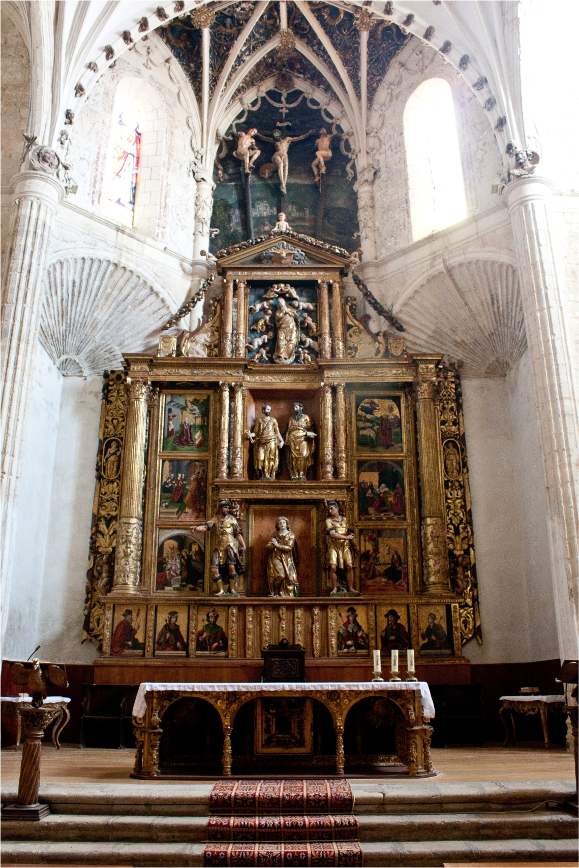 Retablo con las tablas de Pedro Berruguete y las tallas de Inocencio Berruguete y Esteban Jordan